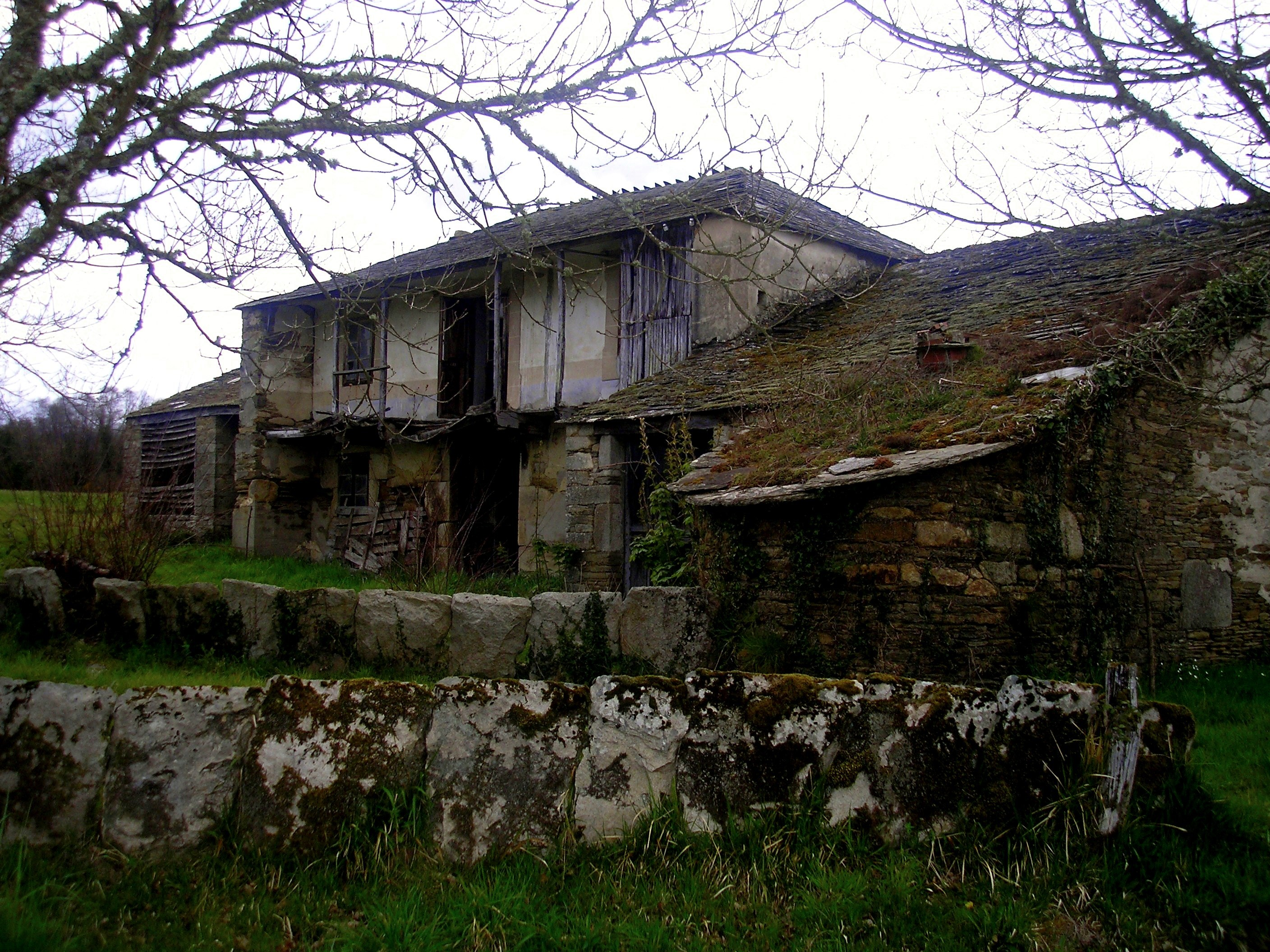 Cospeitoko etxe tipikoa.